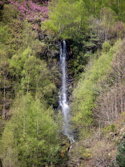 Serra do Courel, Fervenza, Galiza